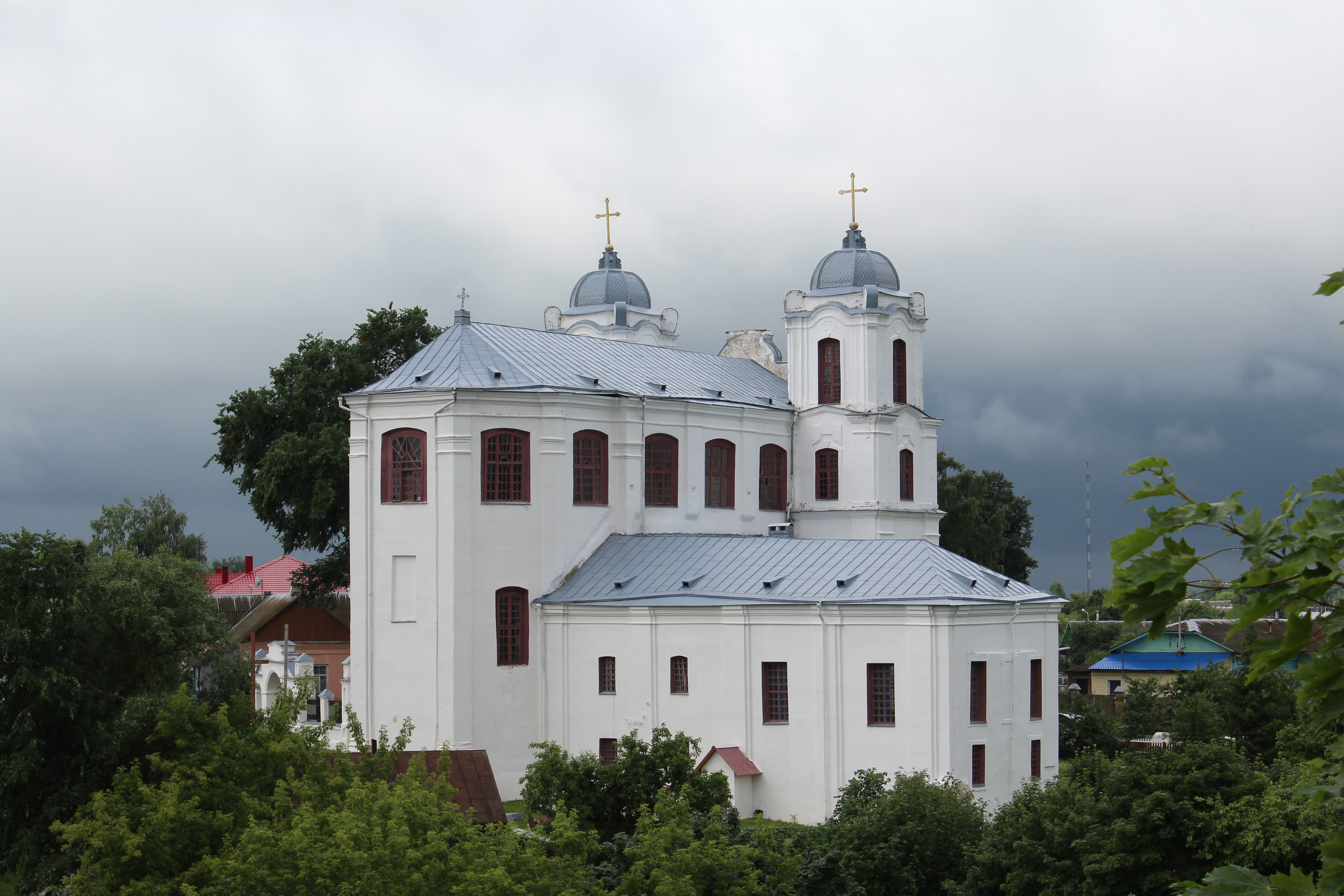 Мсціслаў. Краявіды